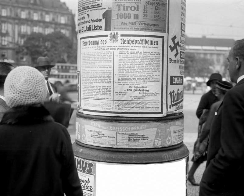 Der Ausnahmezustand in Berlin! Die von der Militärbehörde verhafteten und ihres Amtes enthobenen preussischen Polizeiminister Severing, Grzesinsky, Dr. Weiss und Kommandeur Heimannsberg Die Verordnung des Reichspräsidenten von Hindenburg über den Ausnahmezustand an den Litfassäulen in den Strassen Berlins.